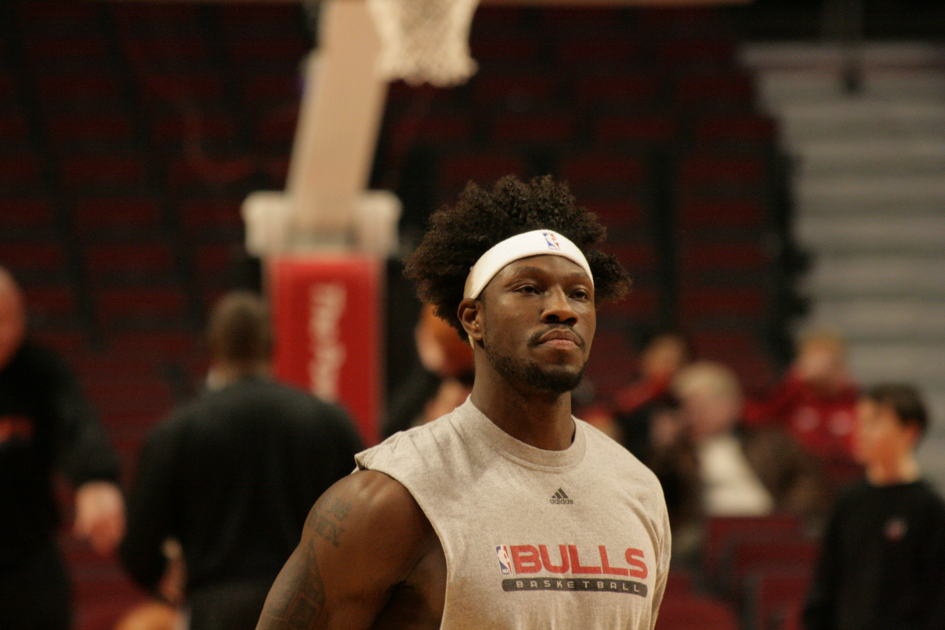 BIG Ben Wallace